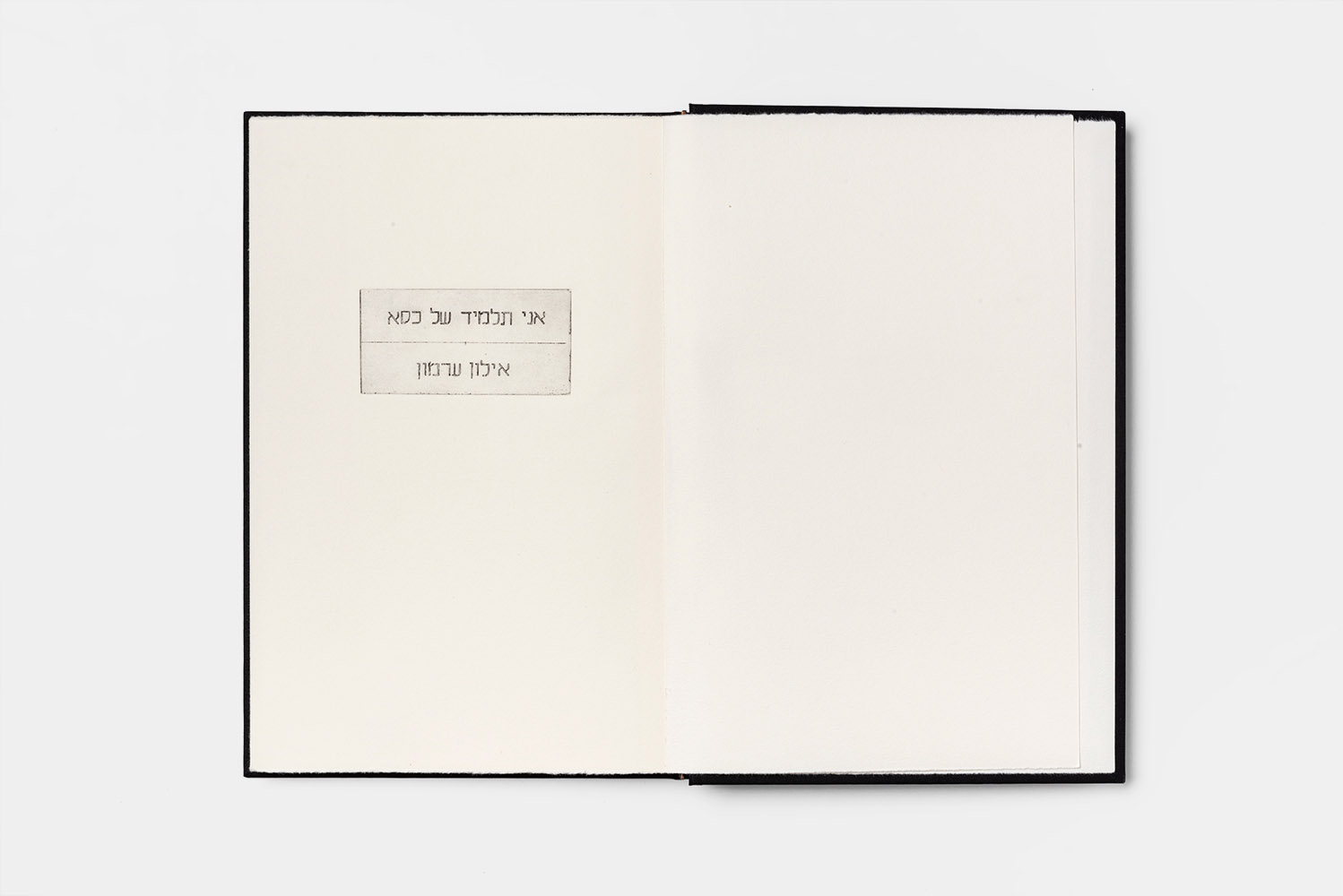 דף מתוך הספר אמן של אילון